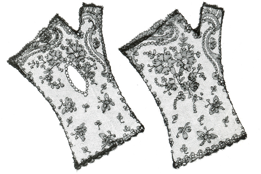 Mitaines met bloem-en bladmotieven in zwarte, Chantilly kloskant; uitgevoerd in netslag op tulegrond.